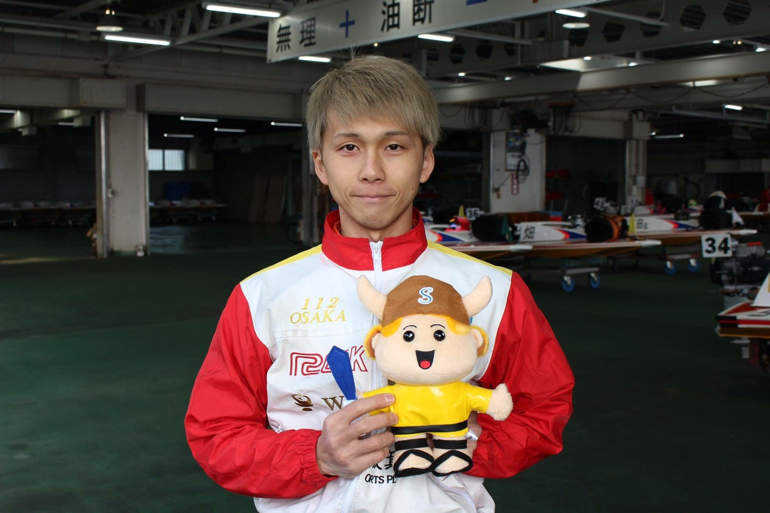 GⅠ初勝利時写真（ボートレース下関にて）